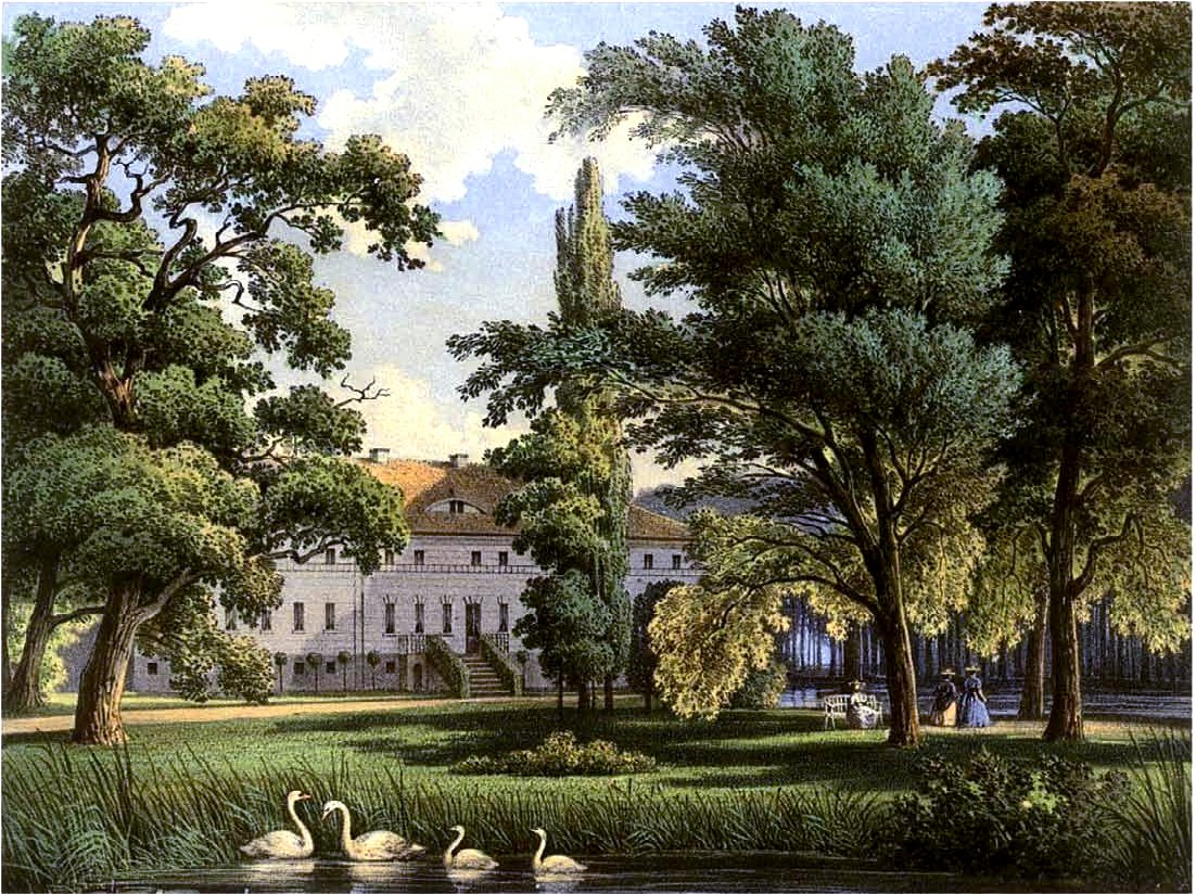 Schloss Vinzelberg, Landkreis Gardelegen, Provinz Sachsen